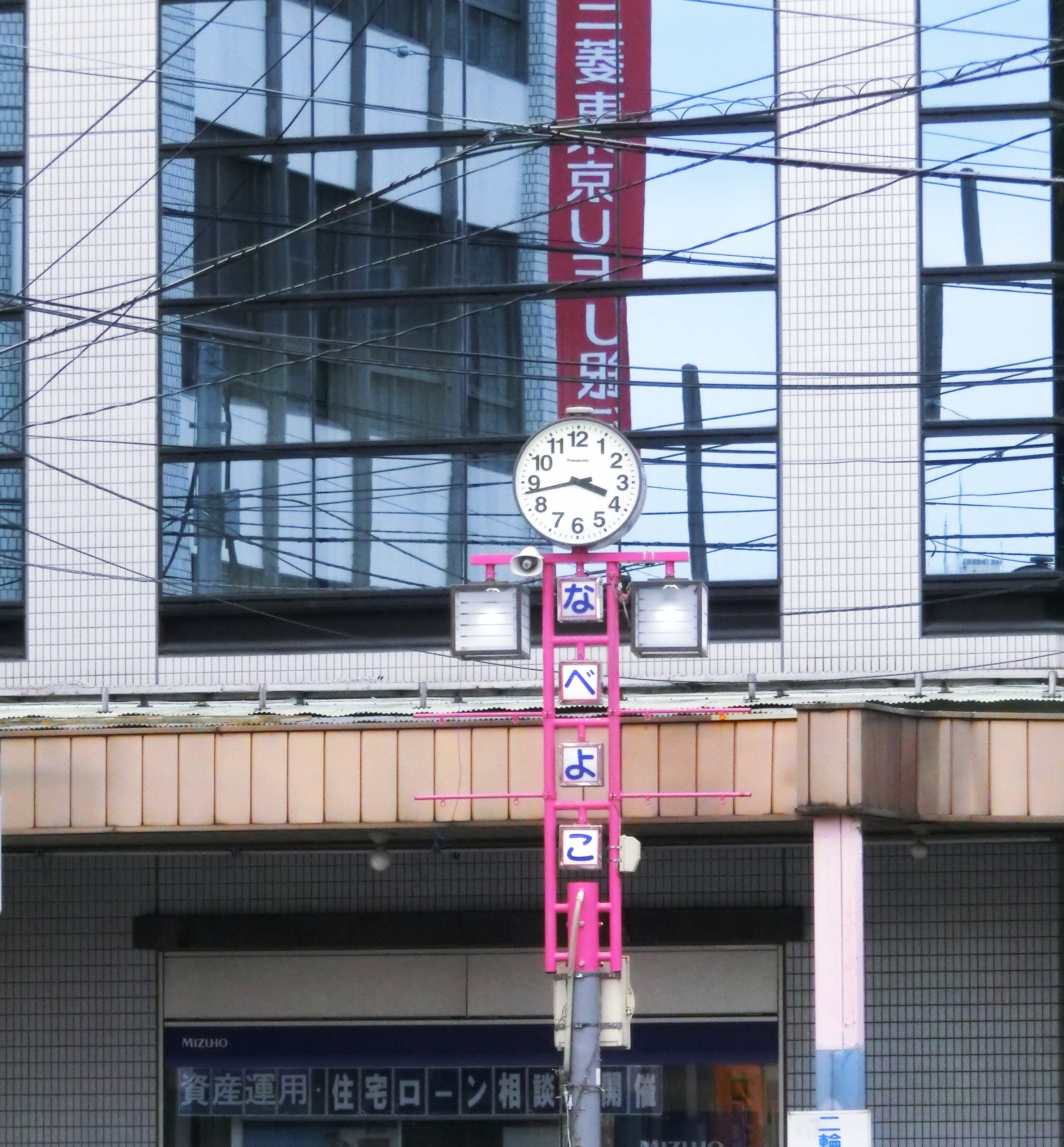 鍋屋横丁入口（「鍋屋横丁」交差点）の南西側、みずほ銀行の入るビルの前の看板